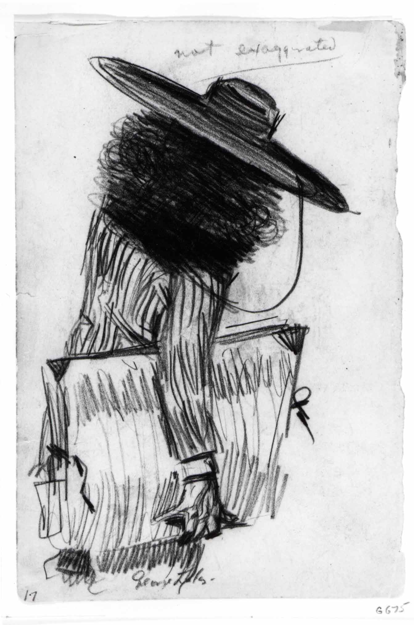 Drawing; Drawings